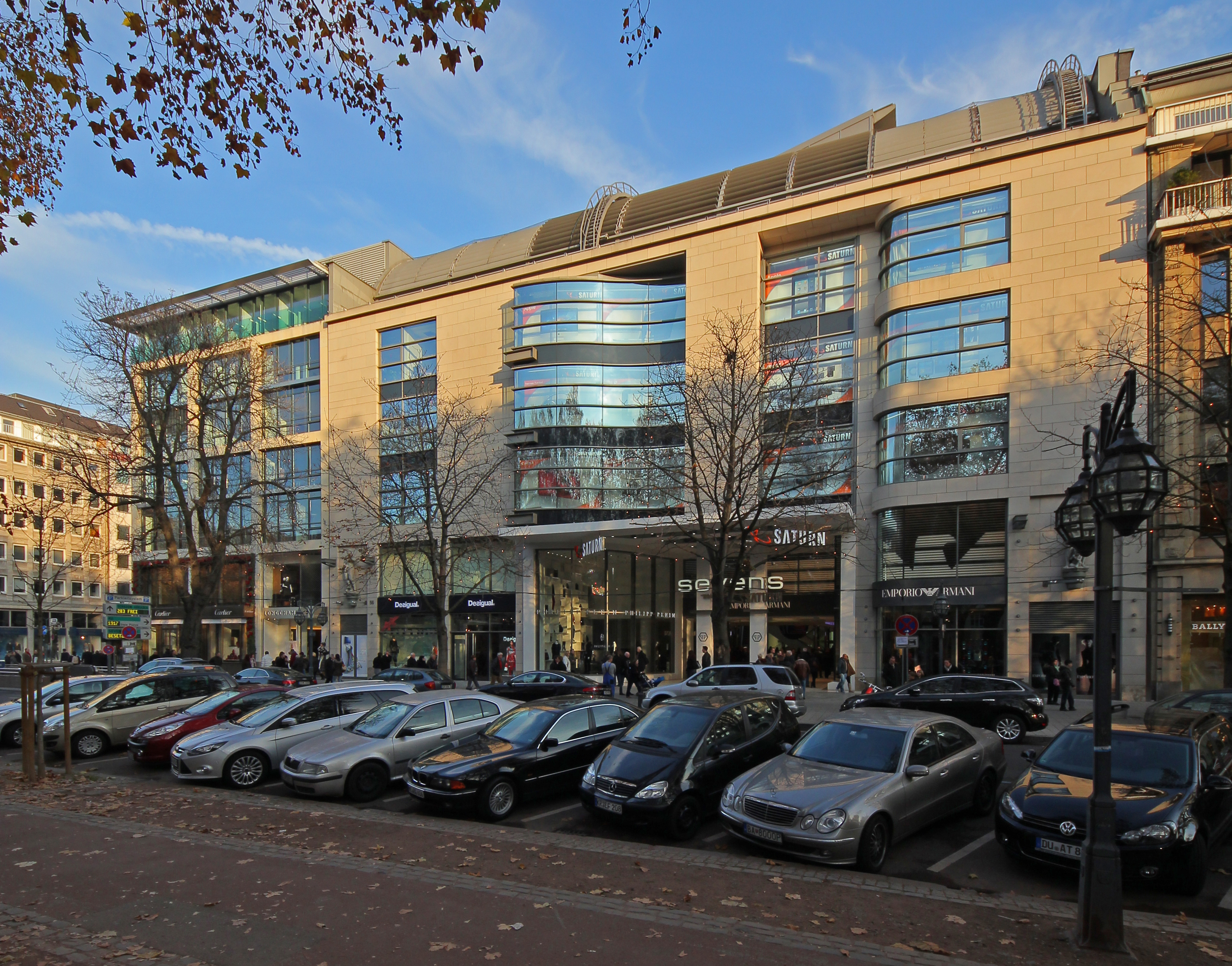 Düsseldorf-Stadtmitte, die Fassade der Einkaufspassage «Sevens Center»